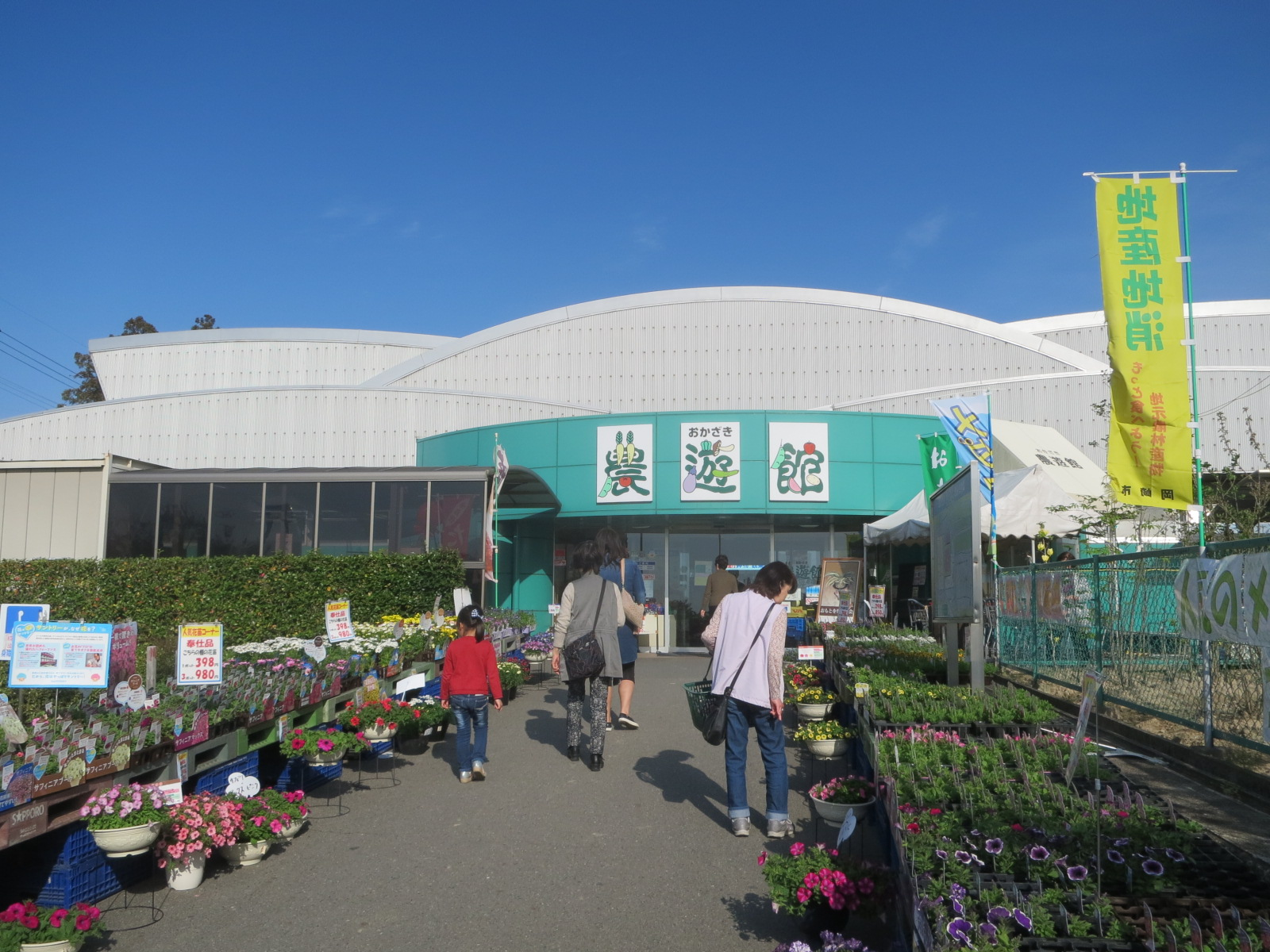 おかざき農遊館（岡崎市）